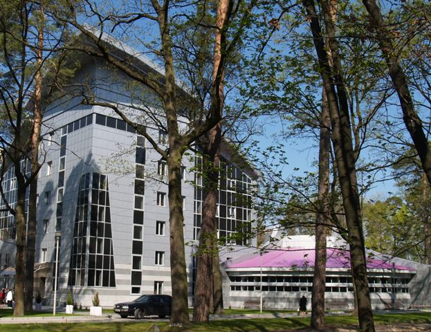 Корпус Відкритого міжнародного університету розвитку людини «Україна»: Корпус Відкритого міжнародного університету розвитку людини «Україна»(вул. Львівська 23)